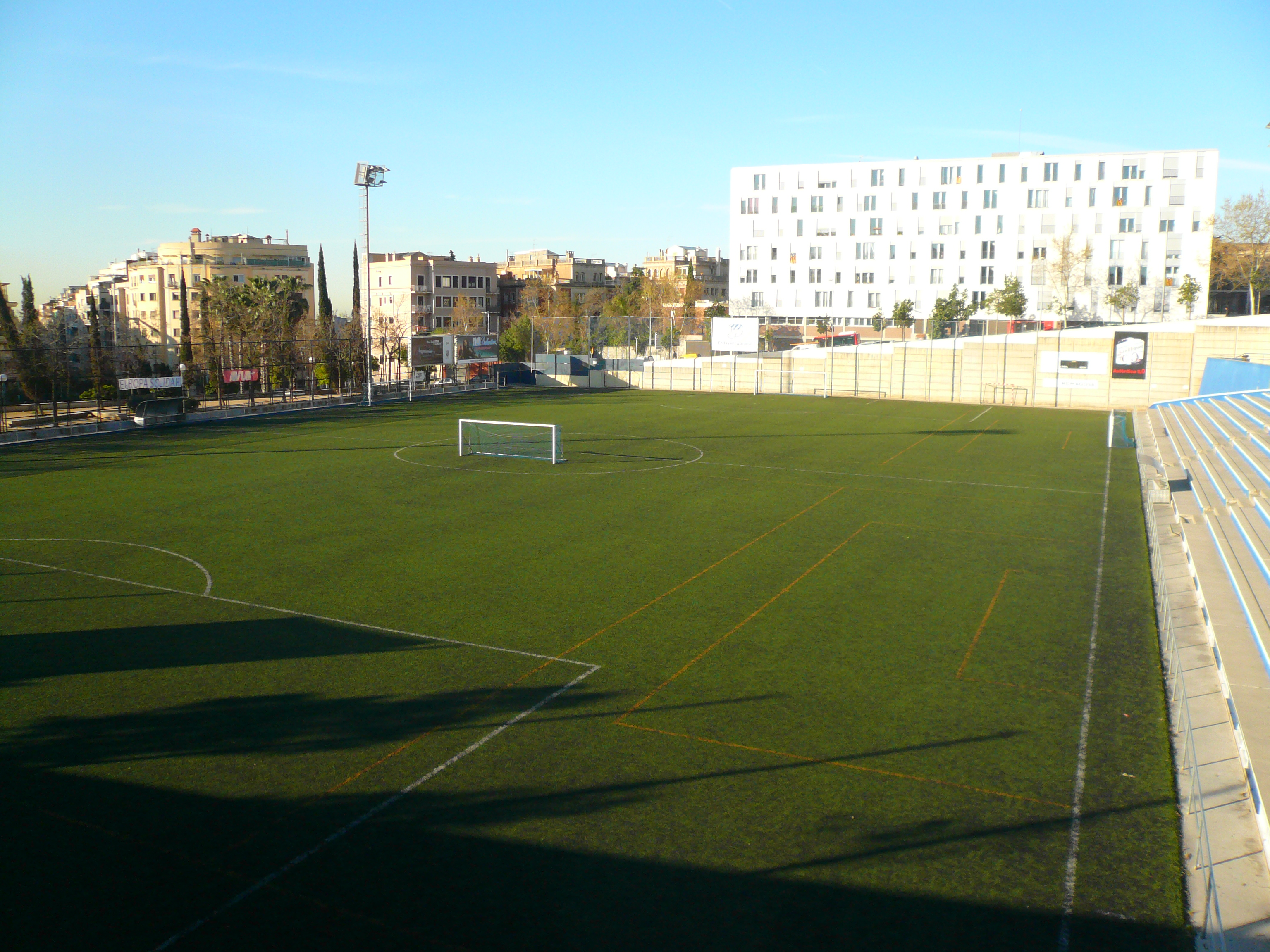 Camp de l'Àliga, gestionat pel CE Europa, a la plaça Alfonso Comín de Barcelona.